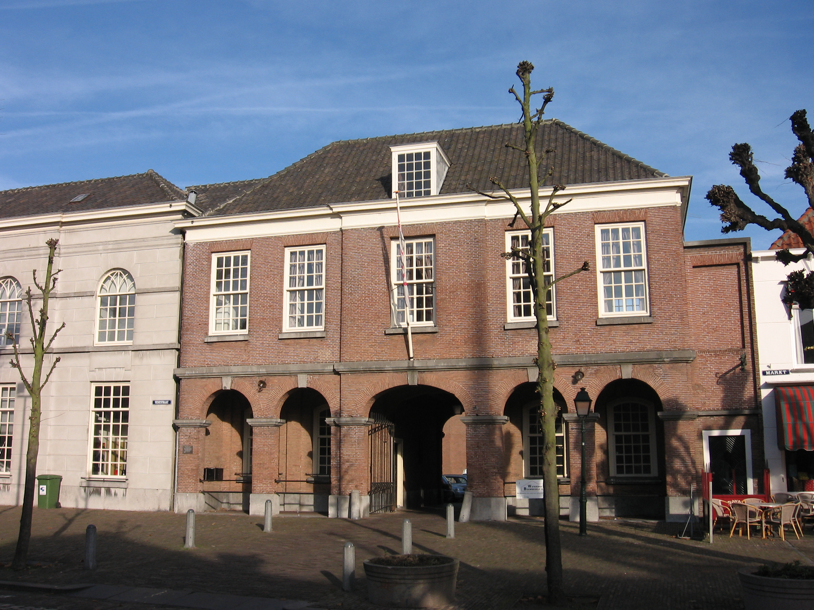 hoofdwacht (Markt kazerne), Geertruidenberg